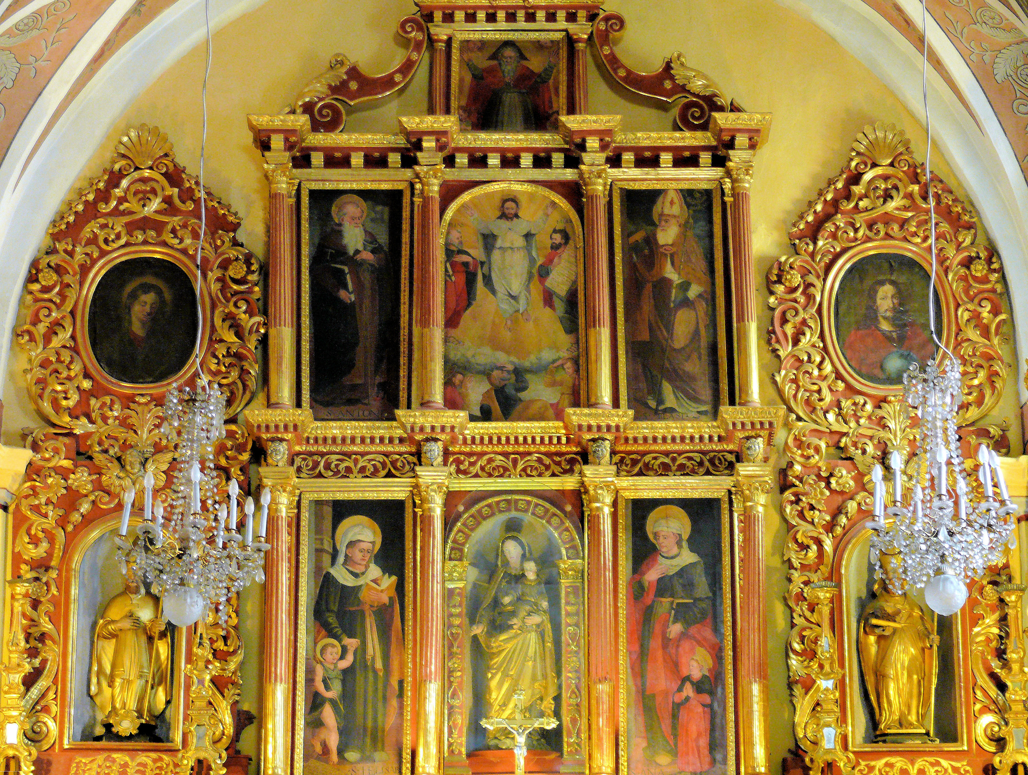 Saint-Sauveur-sur-Tinée - Eglise Saint-Michel-Archange - Retable du maître autel réalisé par Guillaume Planeta en 1583